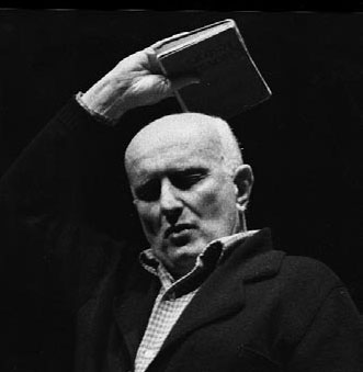 Giovanni Testori in a portrait by Valerio Soffientini